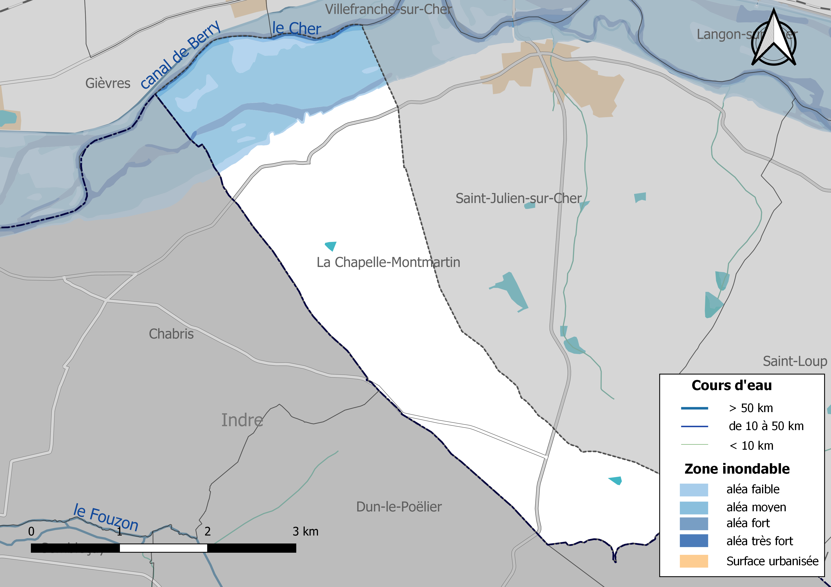 Carte des zones inondables de la commune de La Chapelle-Montmartin (France).